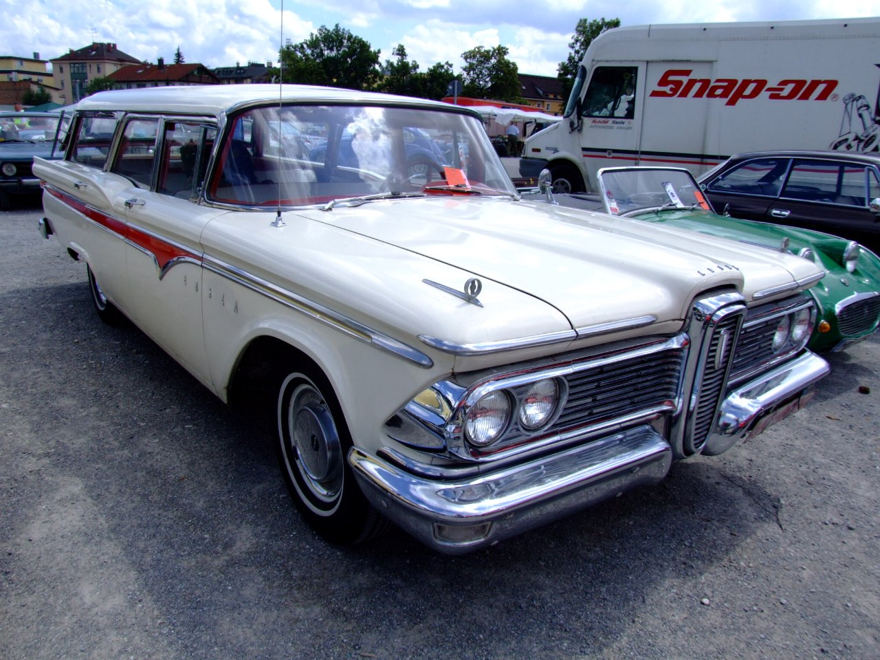 Quelle: selbst fotografiert, 07/2006 Fotograf: Späth Chr.